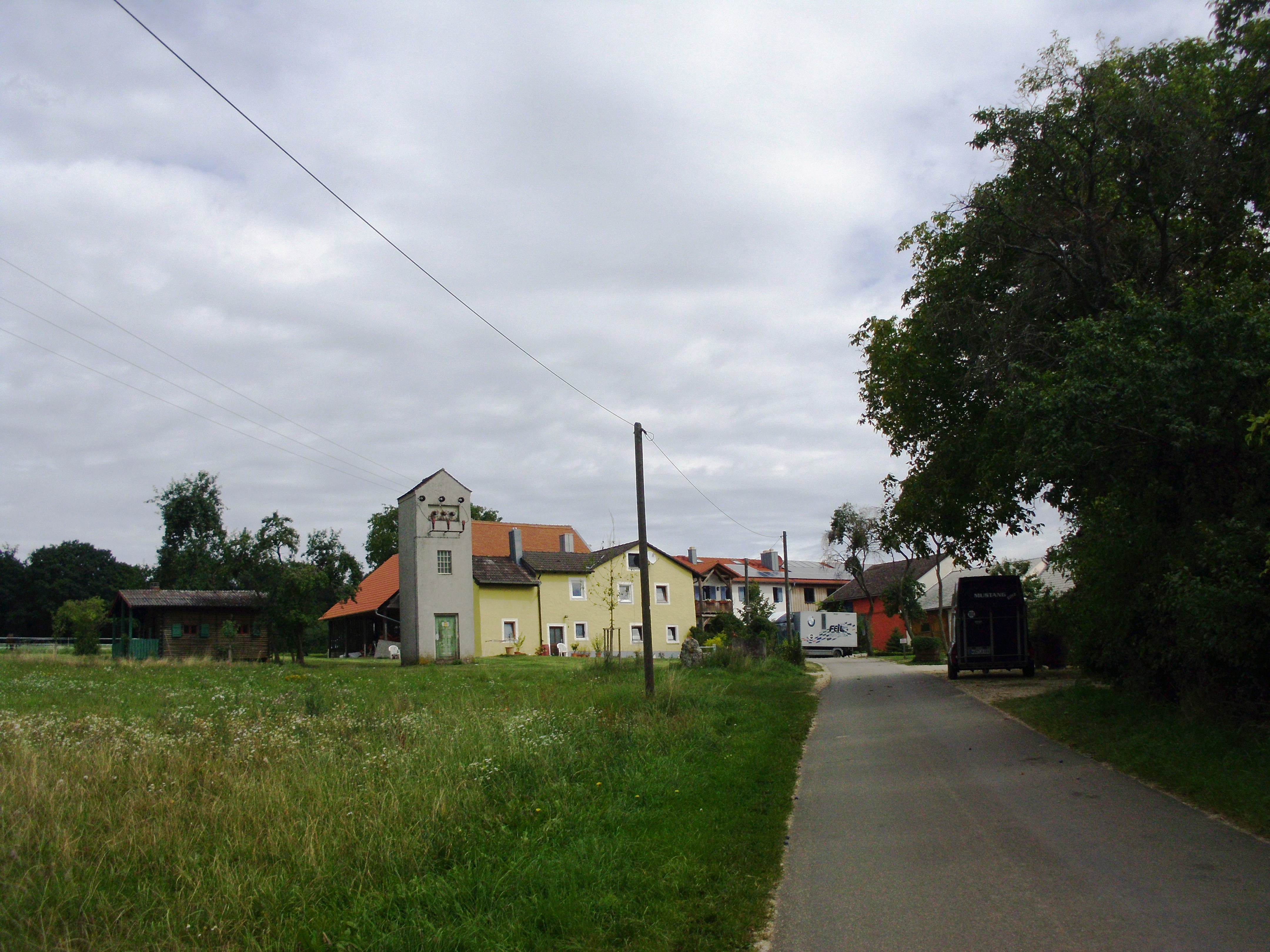 Bonhof, Ortssteil von Treuchtlingen im mittelfränkischen Landkreis Weißenburg-Gunzenhausen